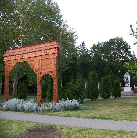 Székelykapu Kistarcsán a Vojna család felajánlásából